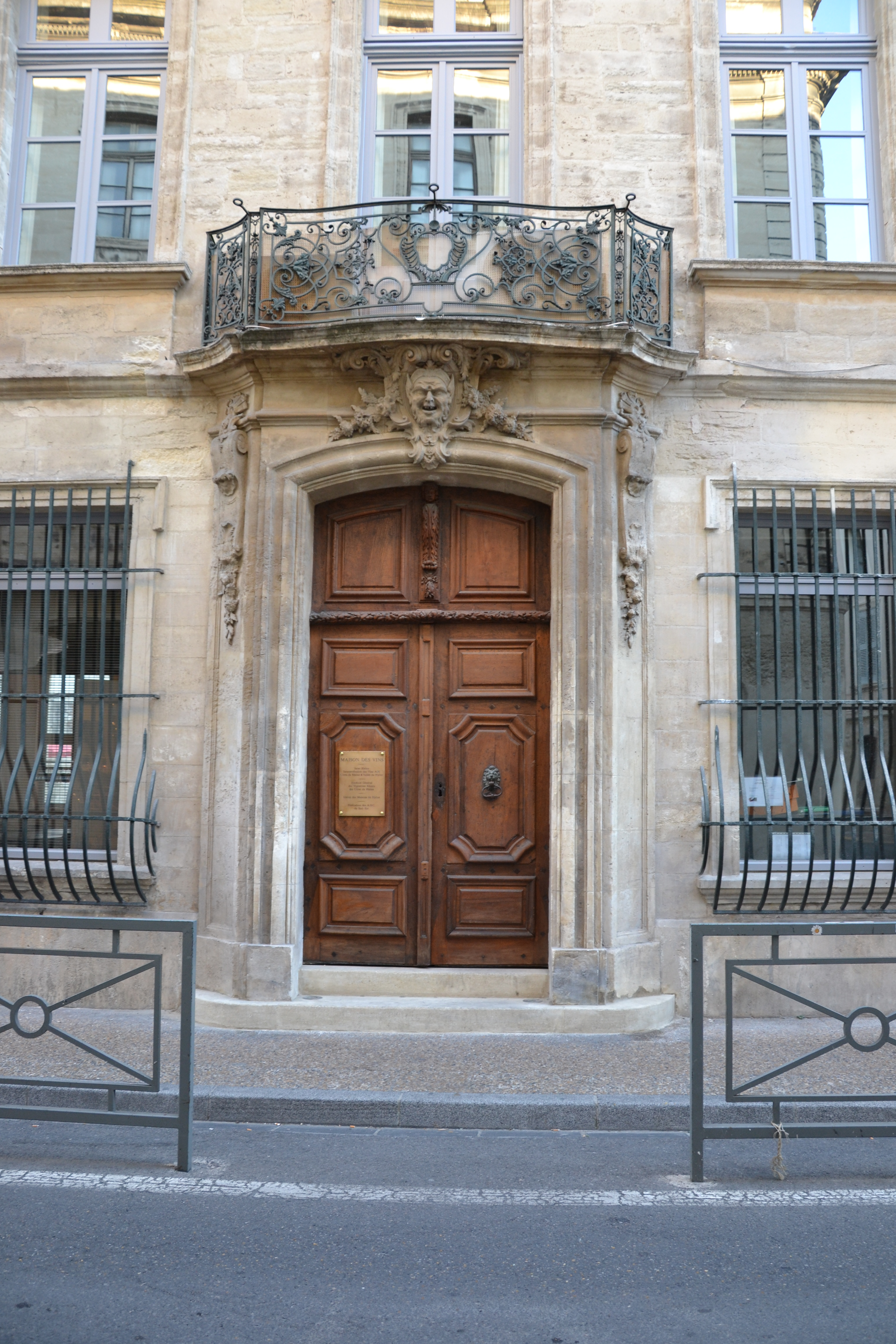 Hôtel de Rochegudebalcon, élévation (Inscrit) .